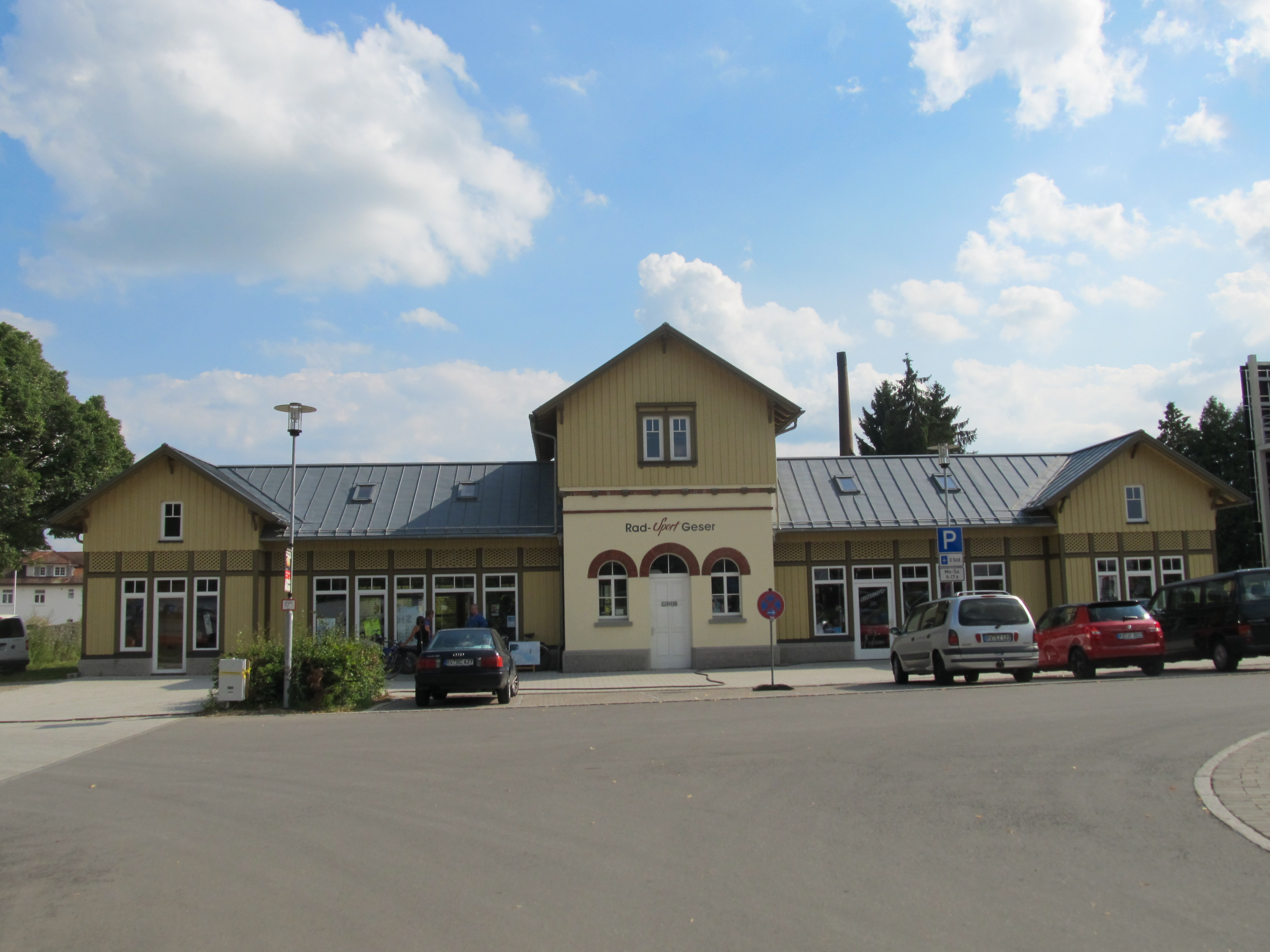 Isnyer Nebengebäude des Leutkirchner Bahnhofes